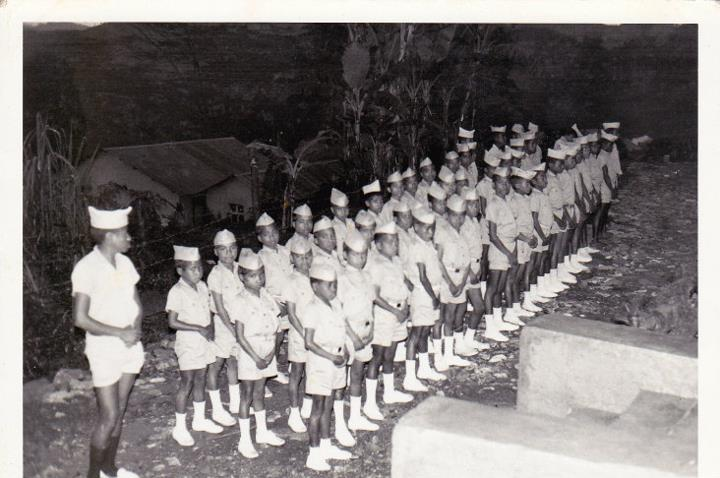 Alunos da escola do Esqudrão